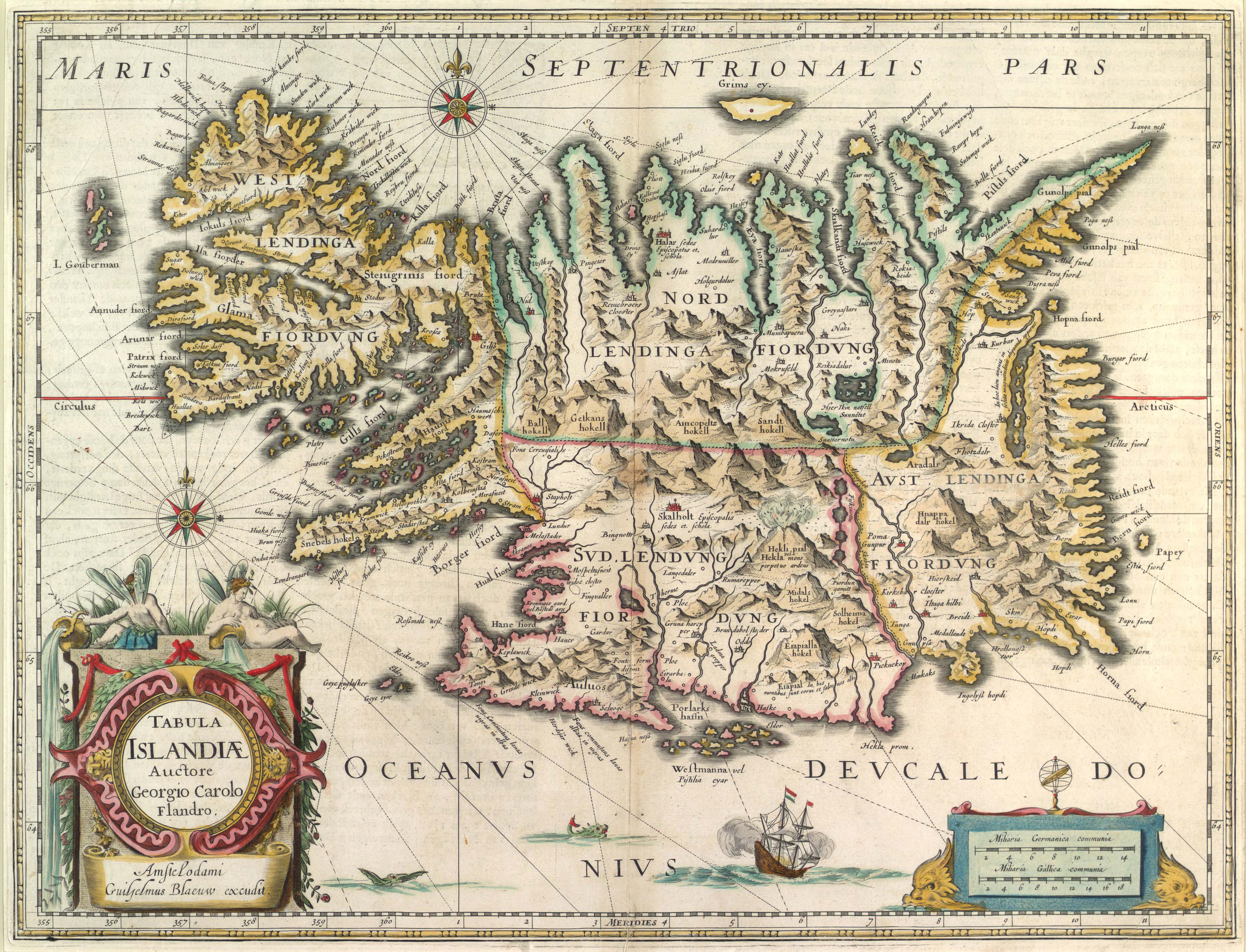 Kaart van IJsland